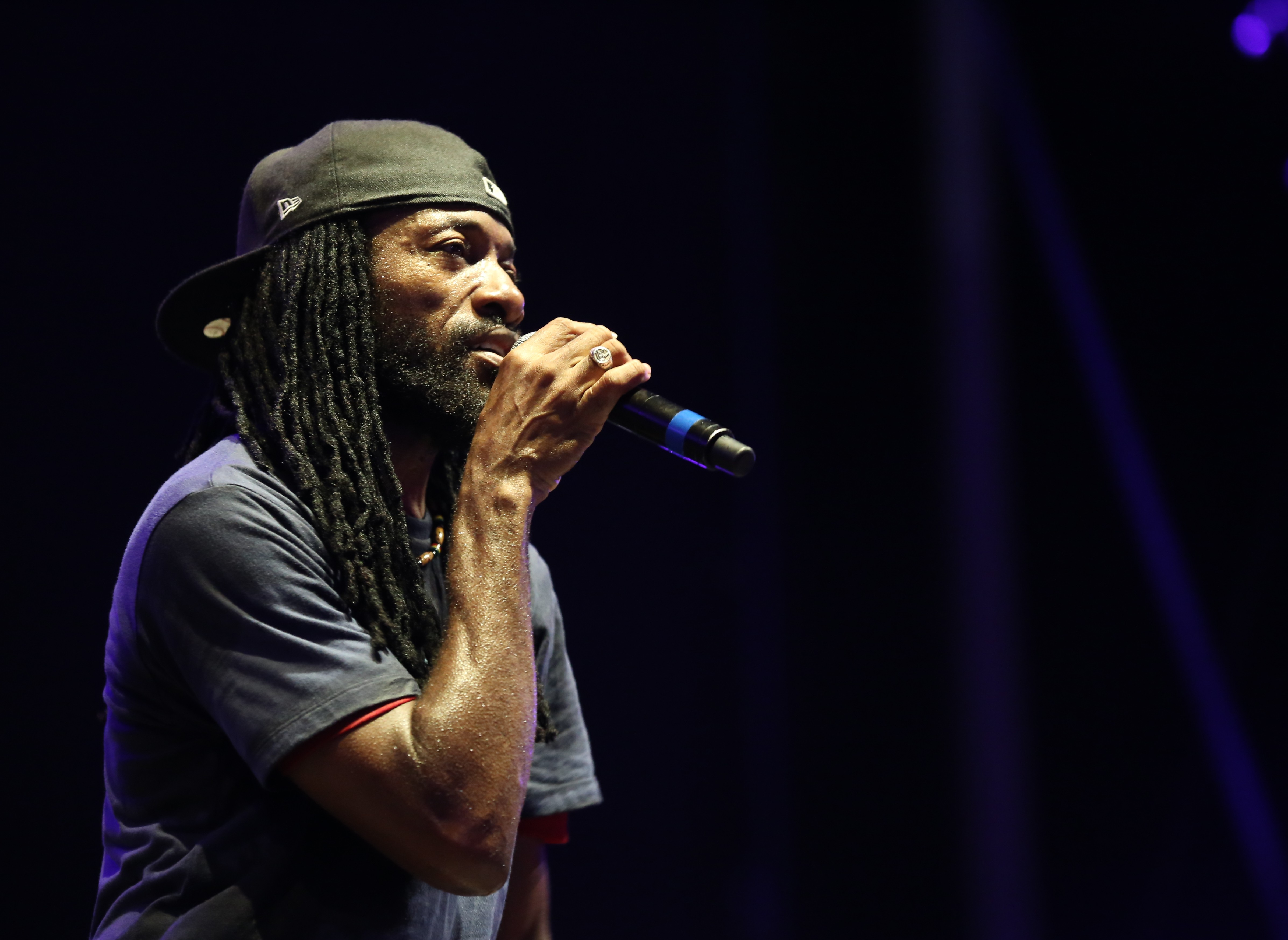 Junior Kelly auf dem Chiemsee Reggae Summer Festival 2013 Festivalsommer This photo was created with the support of donations to Wikimedia Österreich and Wikimedia Deutschland in the context of the CPB project "Festival Summer".